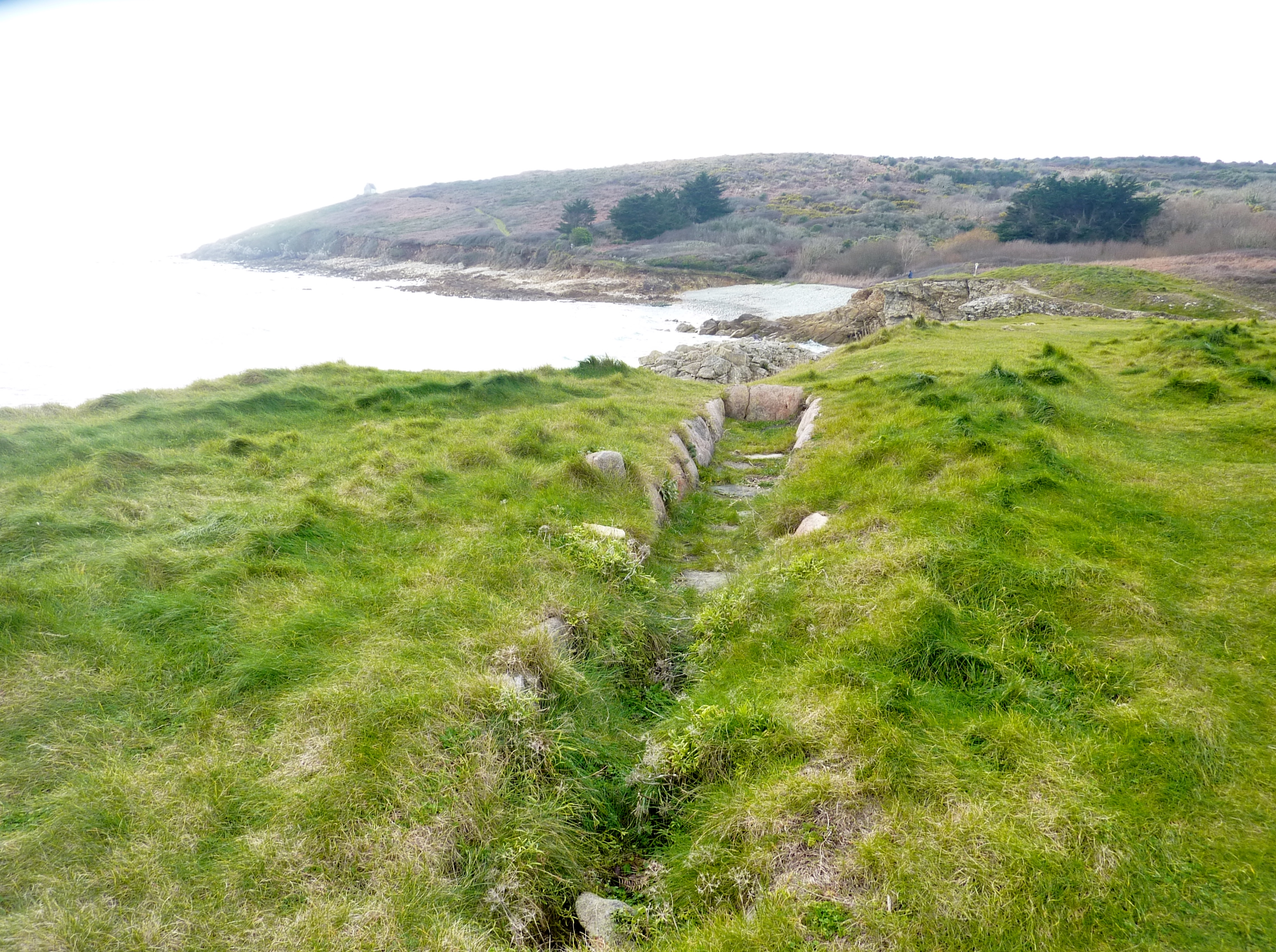 Plogoff : ancien fosse pour le brûlage du goémon sur la partie ouest de l'Anse du Loc'h près de Keringar ; à l'arrière-plan, la Pointe du Mouton